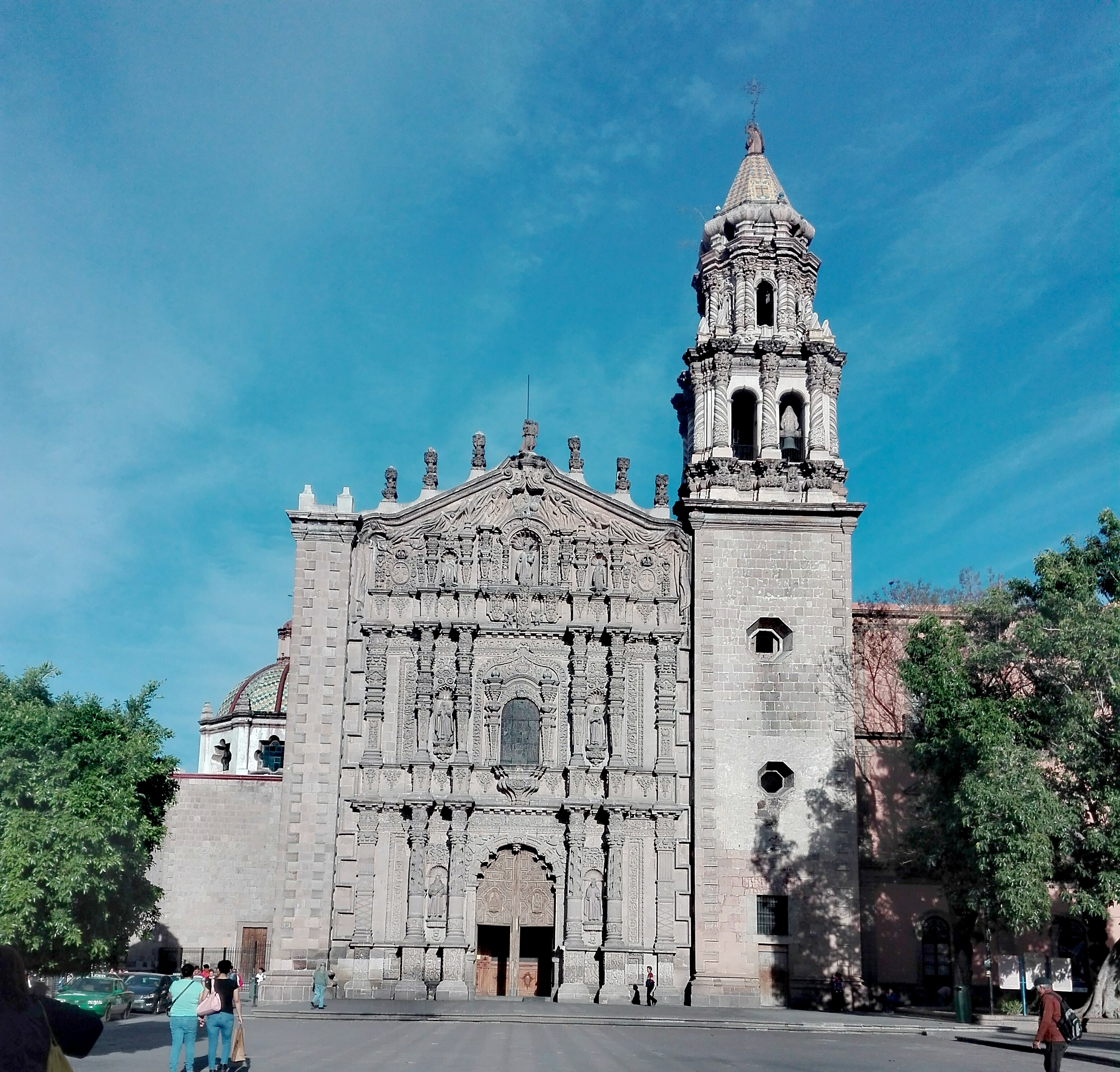 Templo del Carmen, San Luis Potosí, México